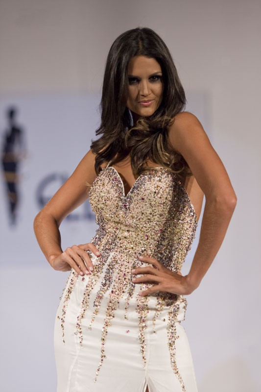 Leryn Franco Steneri